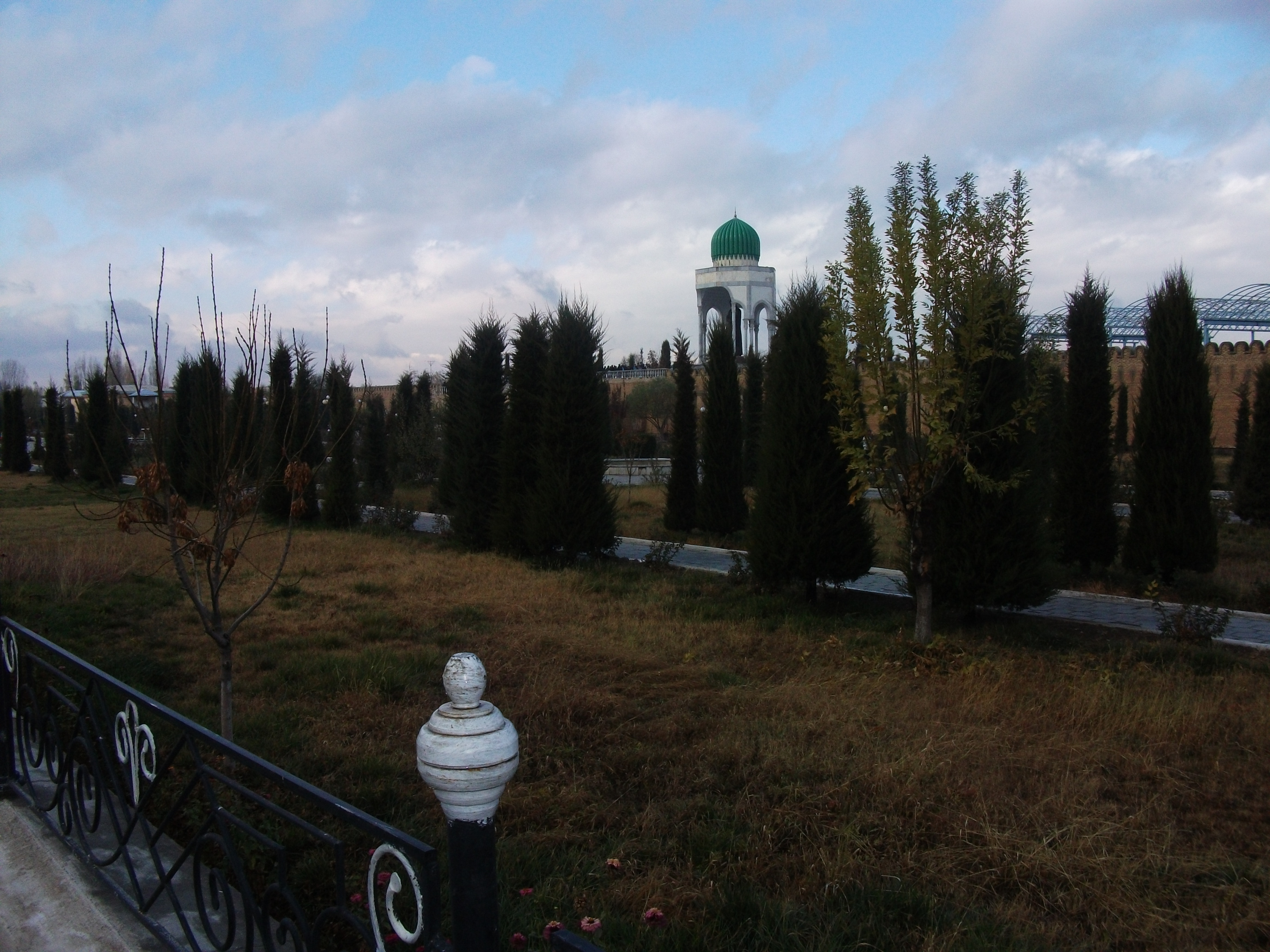 Главная площадь города имени Ахмада Аль-Фергани.